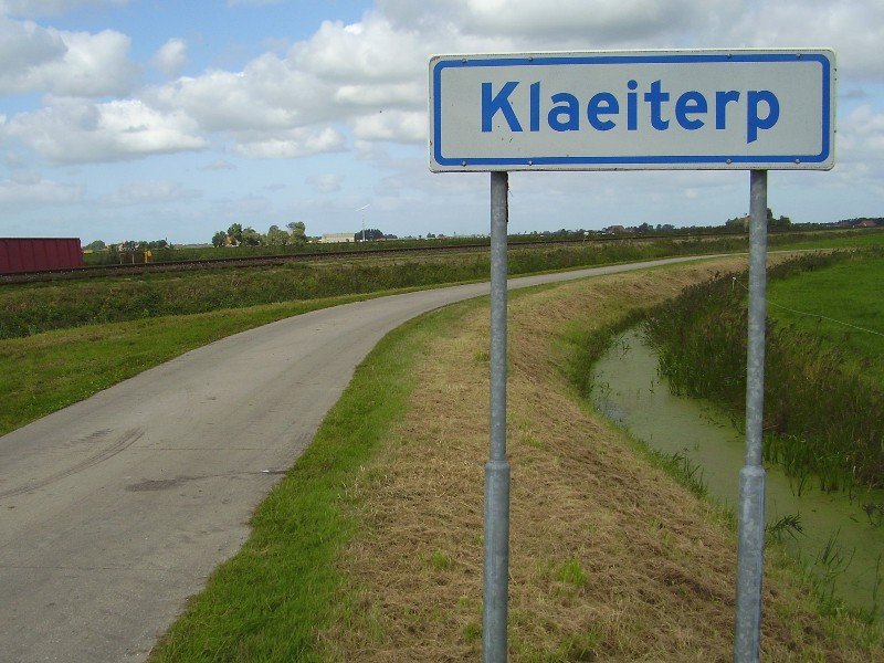 Plaatsnaambord van buurtschap Kleiterp in gemeente Littenseradeel (provincie Friesland, Nederland)